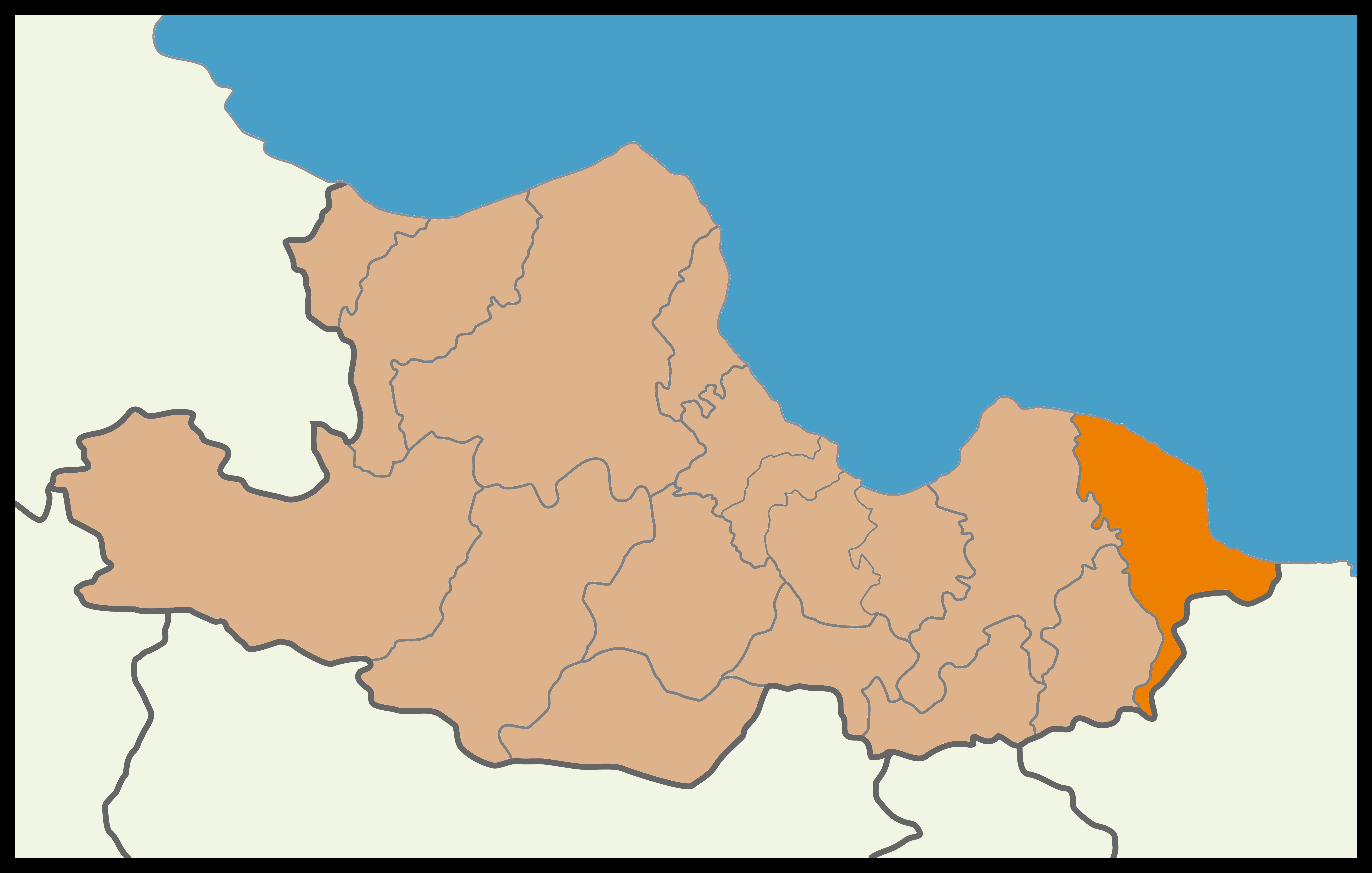 Samsun'un Terme ilçesinin 2015 Türkiye genel seçimleri haritası.